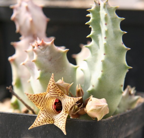 Huernia thuretii, eine von vielen Arten, die „Aasblume“ genannt wird